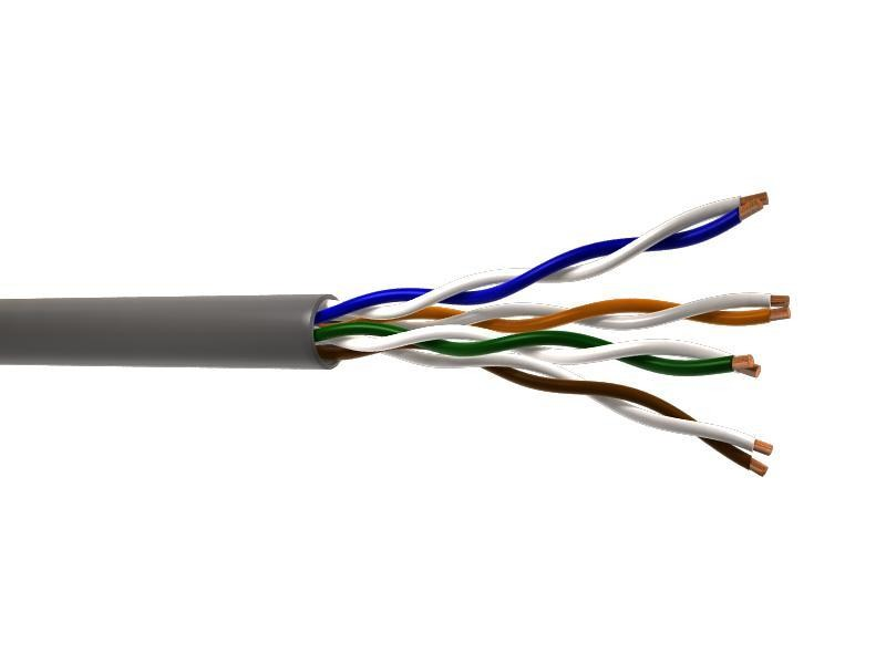 Монгол: Хамгаалалтгүй мушгиа хос